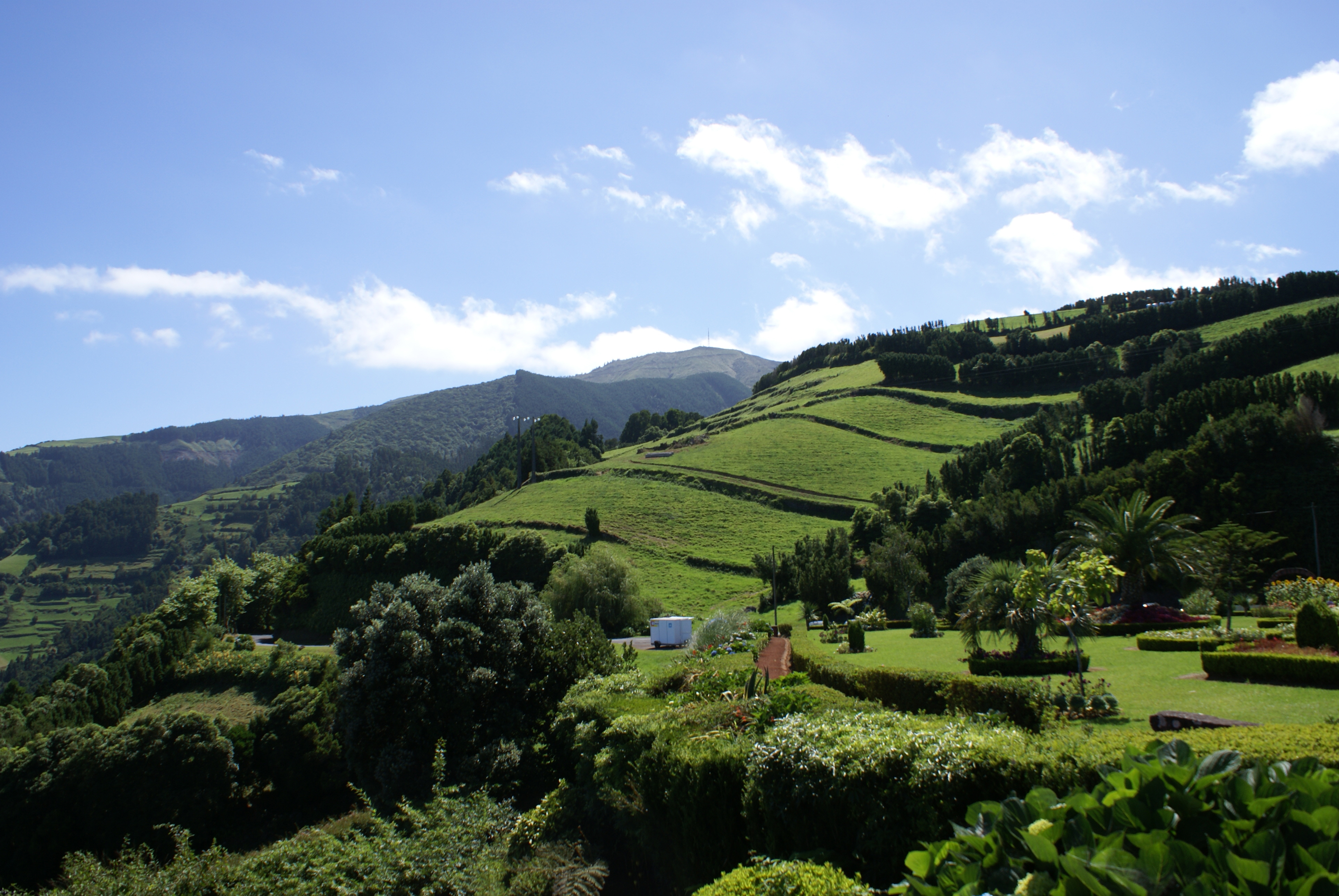 Miradouro da Ponta de Sossego, Nordeste, ilha de São Miguel, Açores